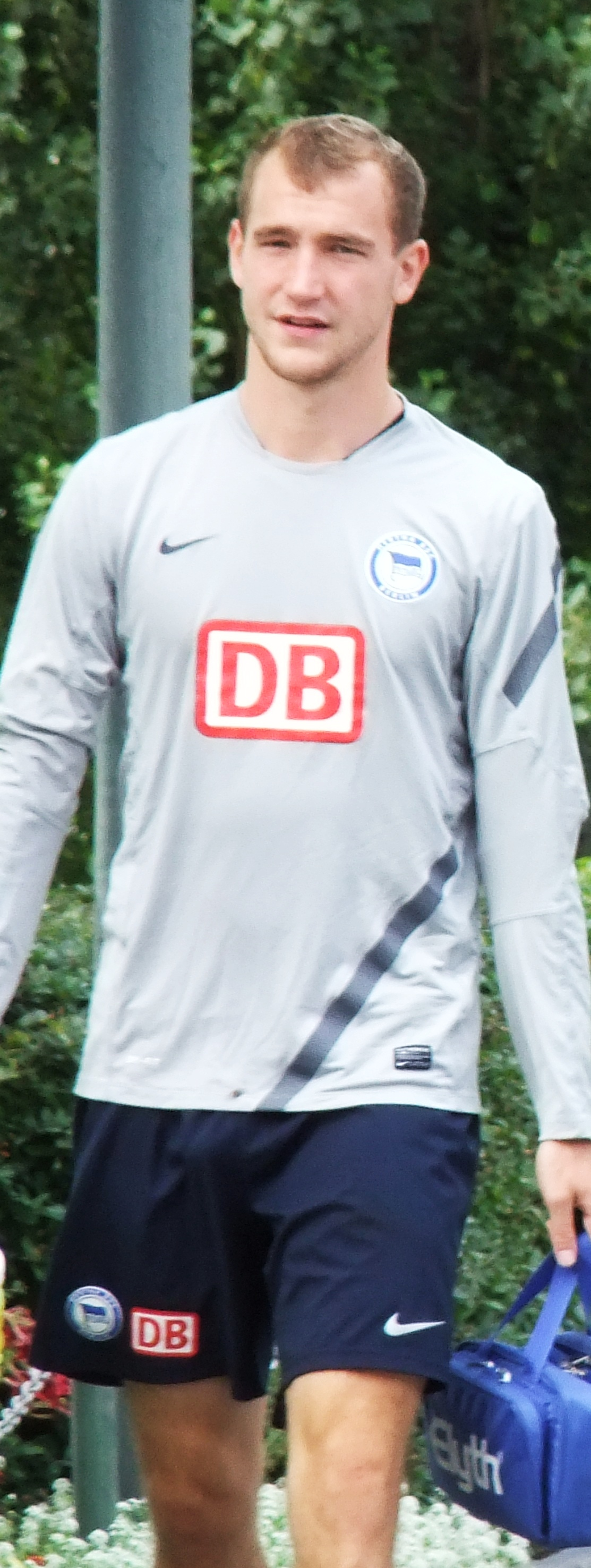 Sebastian Neumann, 2011